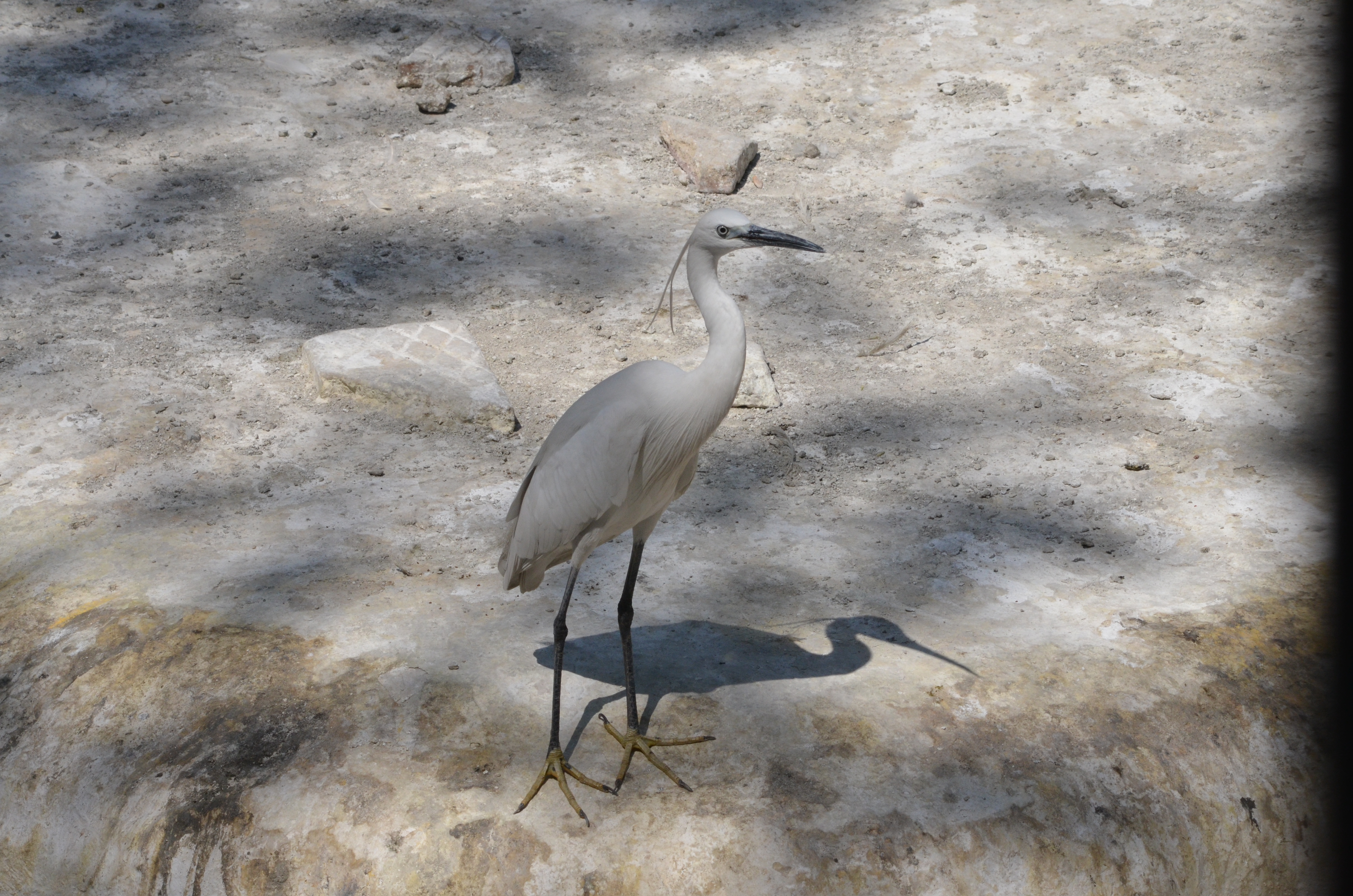 بلشون أبيض في حديقة حيوان الجيزة